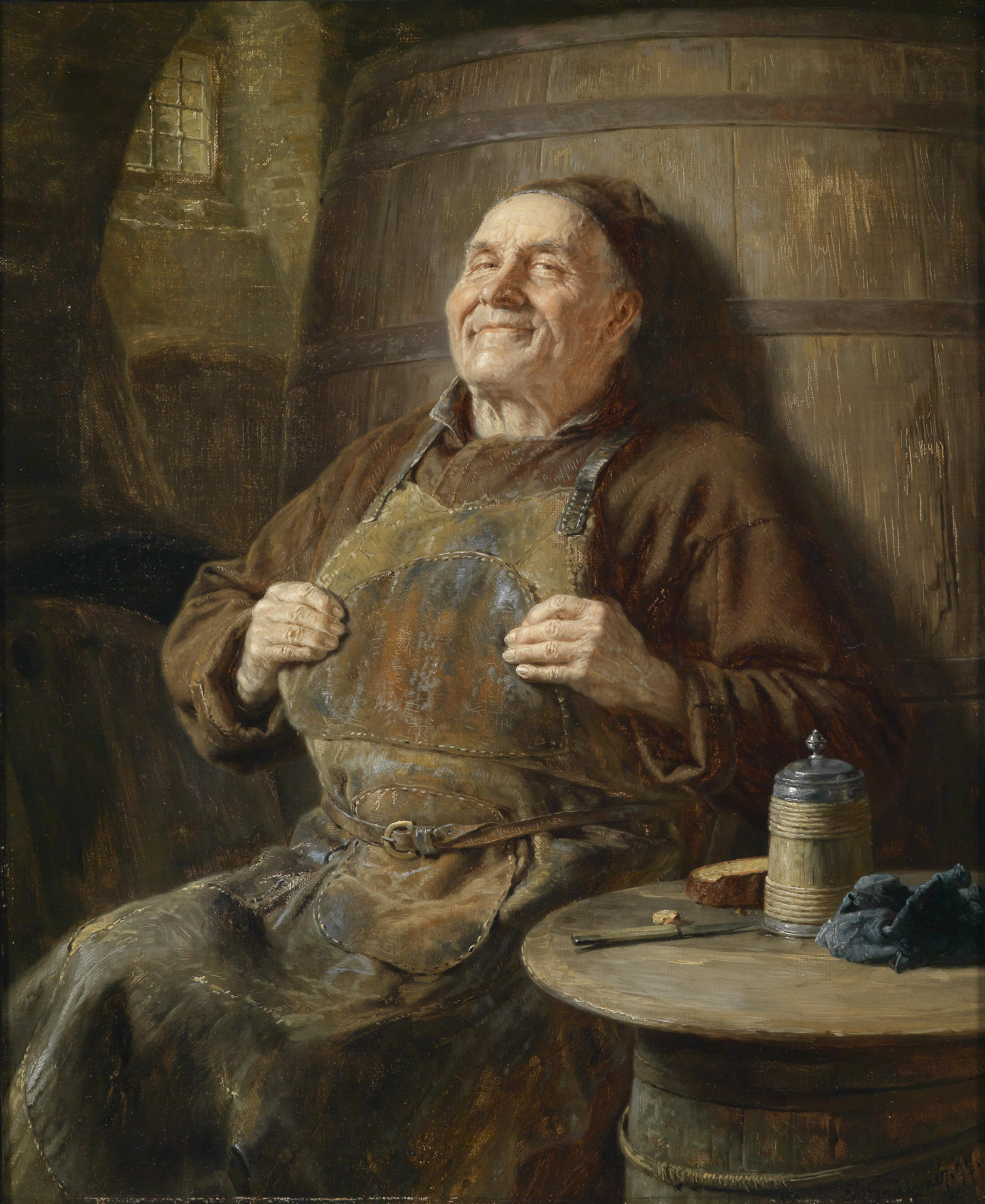 "Beschauliche Ruhe", signiert, datiert Ed. Grützner (18)97, Öl auf Leinwand, 47 x 37 cm